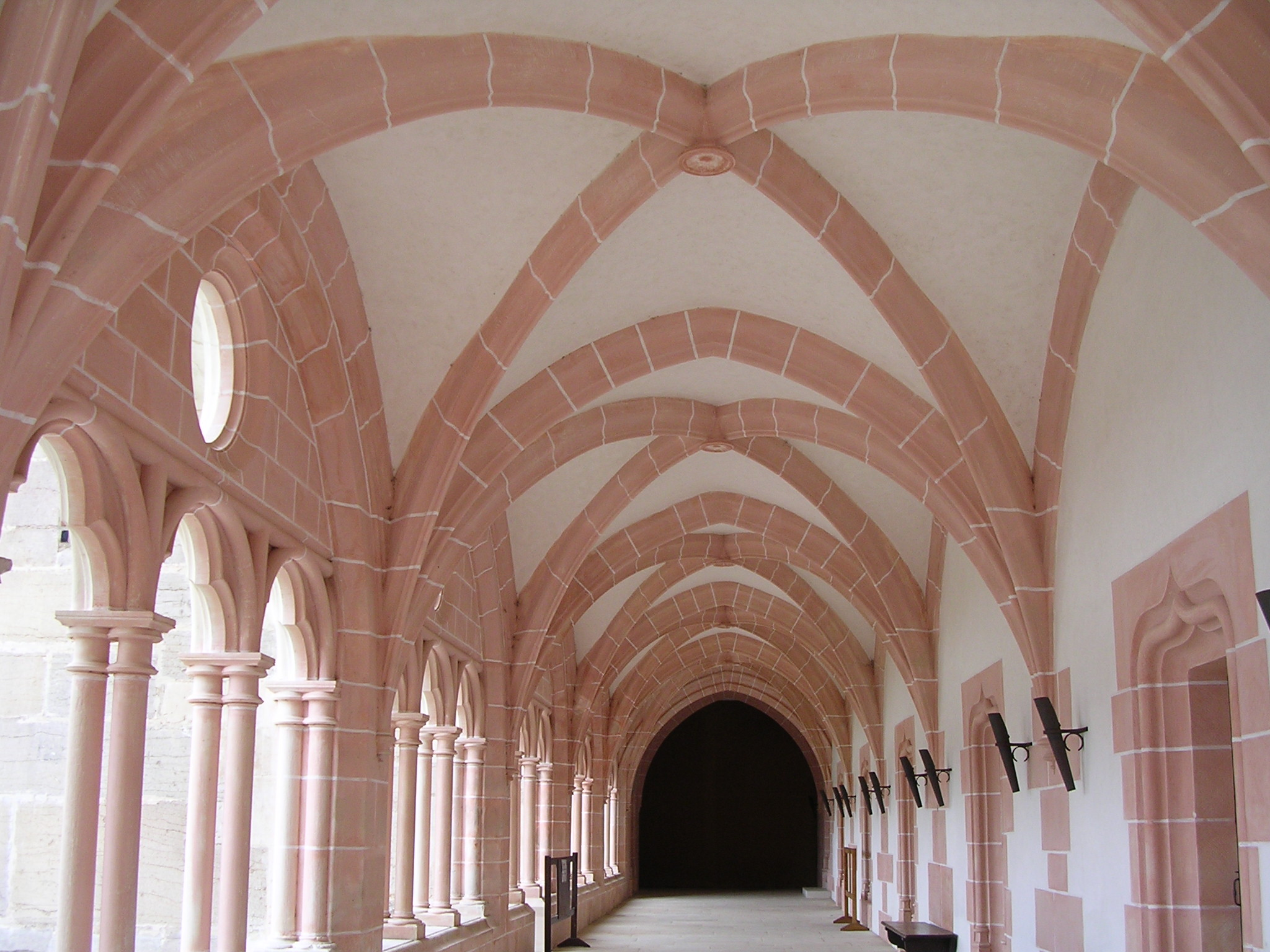 L'abbaye de Cîteaux — Cloître de la bibliothèque du XVIe siècle. Classée monument historique. Restaurée